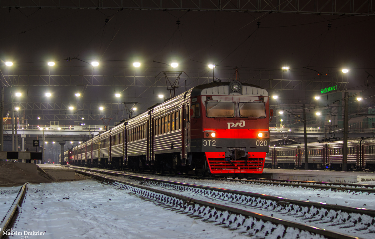 Построен в десятивагонной составности. С завода поступил в депо Москва-Октябрьская Октябрьской ж. д. Передан в депо Новосибирск Западно-Сибирской ж. д. КР КРасноярский ЭВРЗ 2015 г.